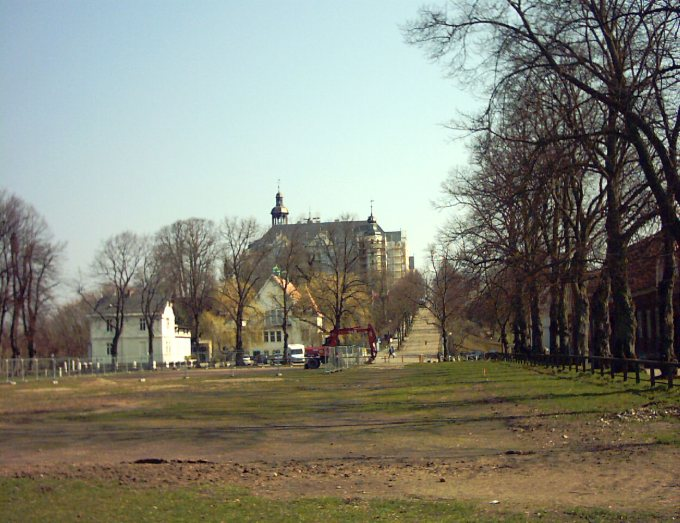 Schloss Plön von der Westseite